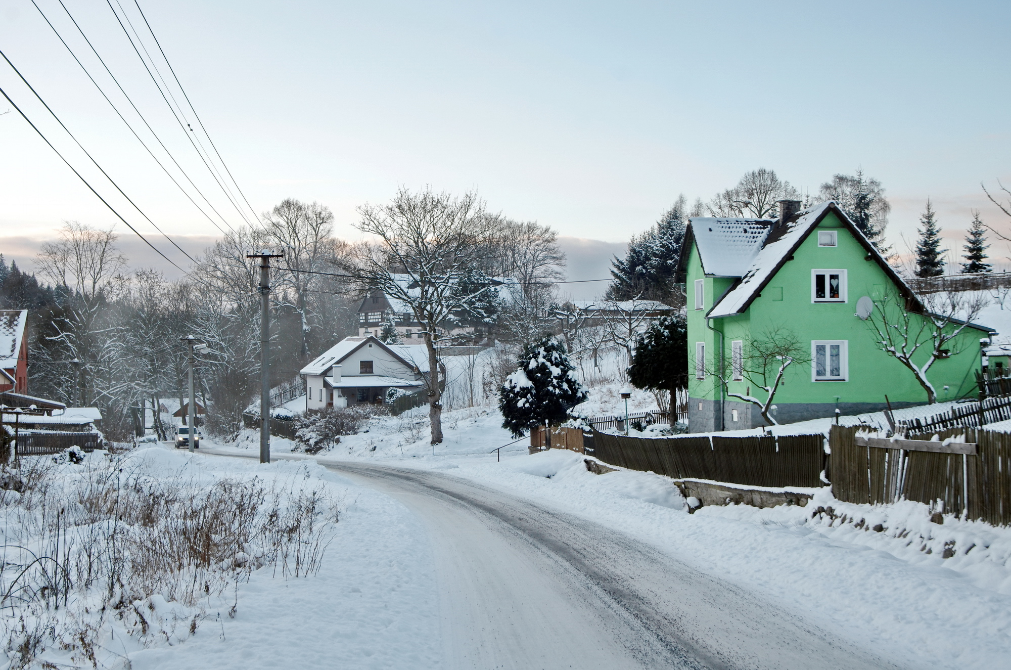 Hrušková, část města Sokolov